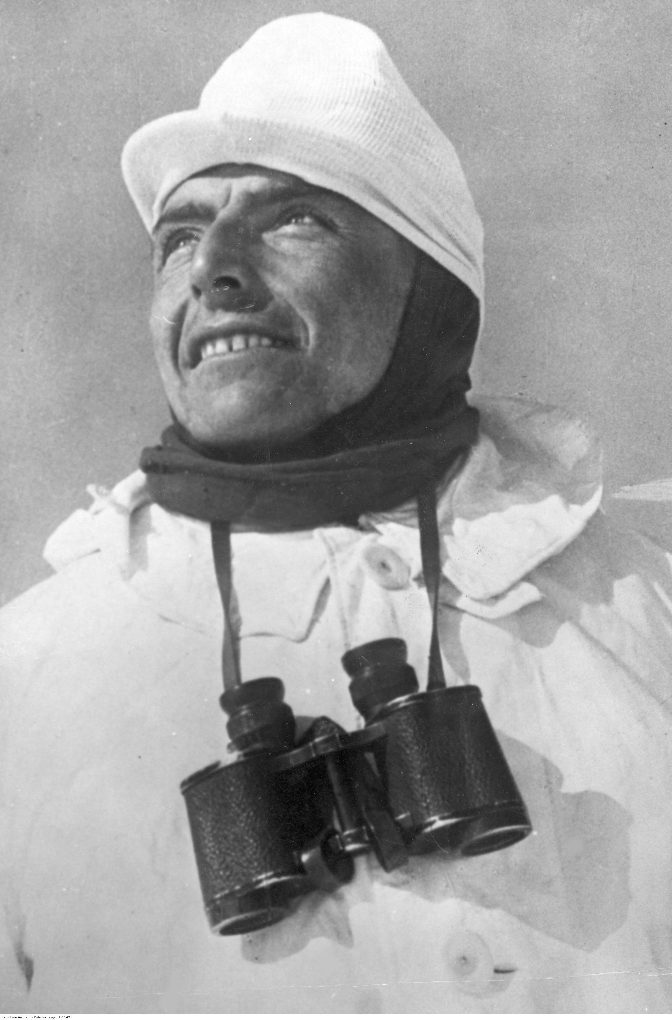 Willi Bogner en 1942